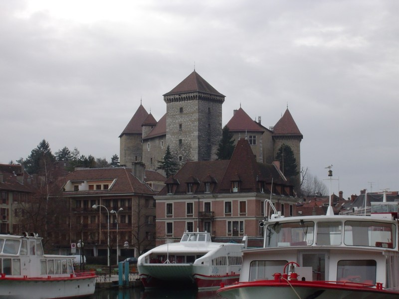 Musée-château d'Annecy vu des jardins de l'Europe. 2004, Didier Halatre